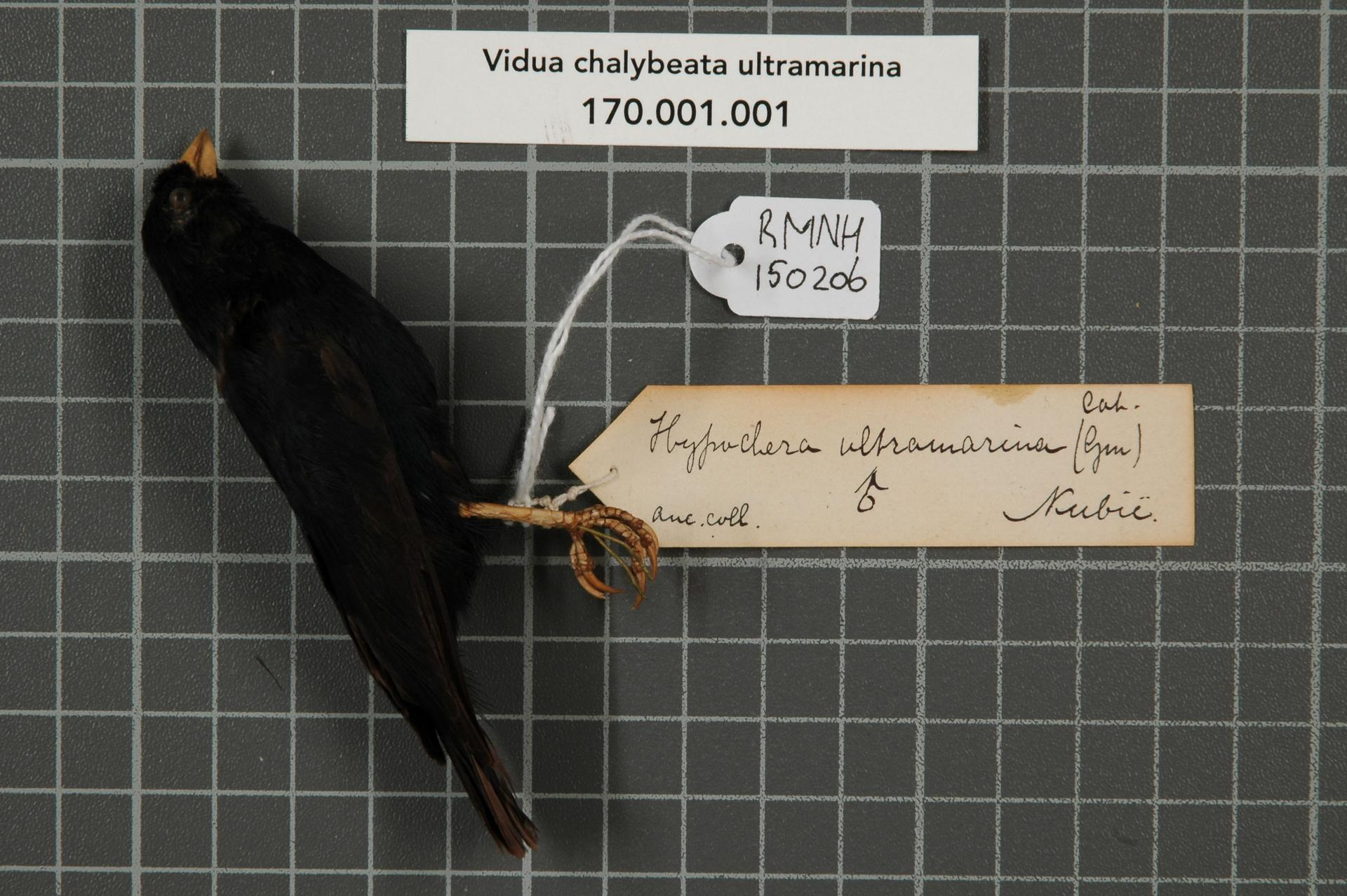 Presua chalybeata ultramarina (Gmelin, 1789)